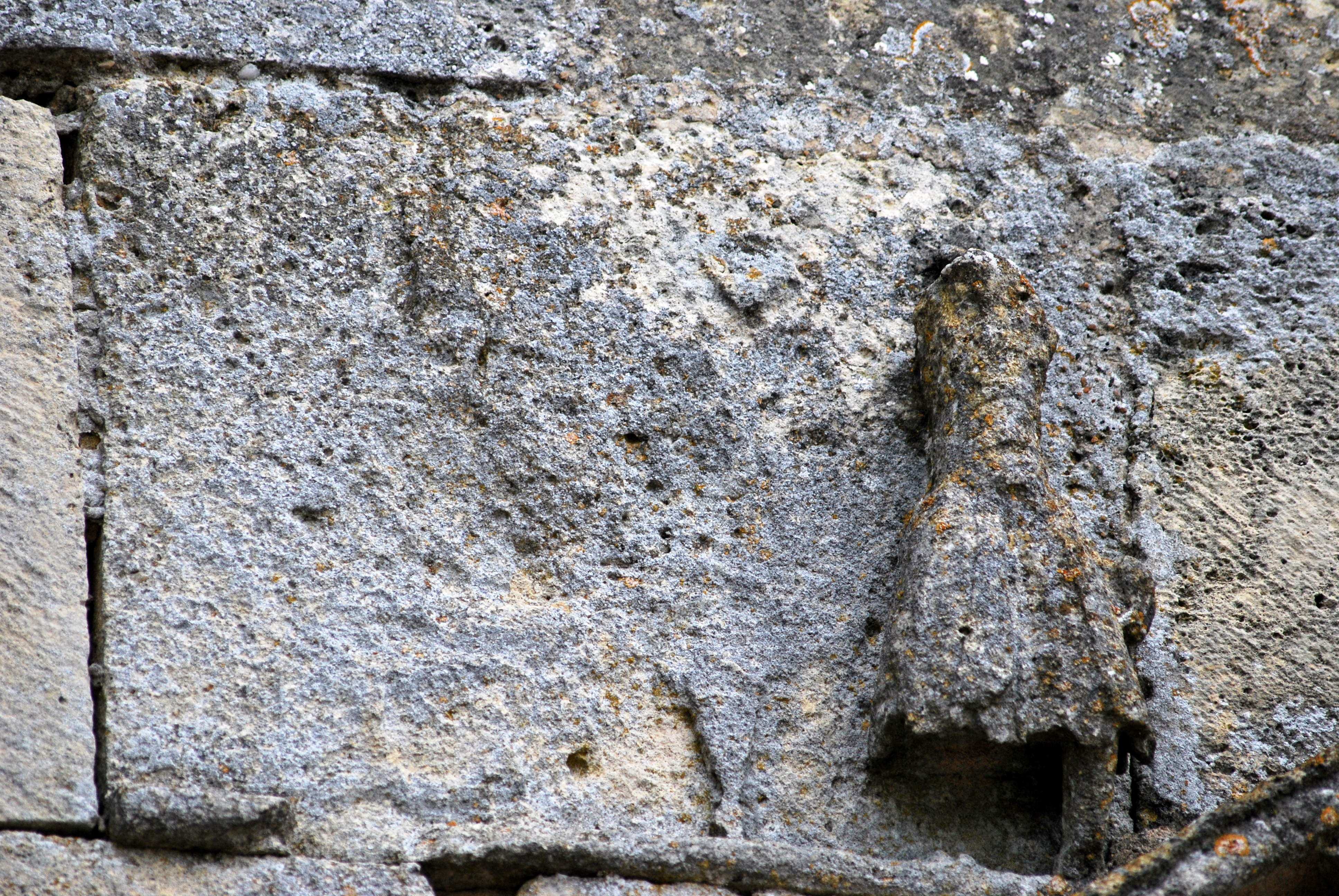 Haux église St Martin